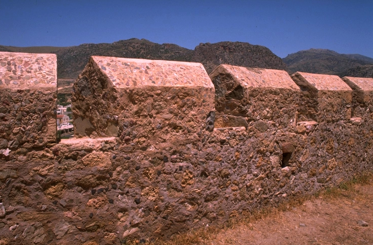 Kreta, Paleochora, Blick von der Burgruine auf dem äußersten Sporn der Halbinsel